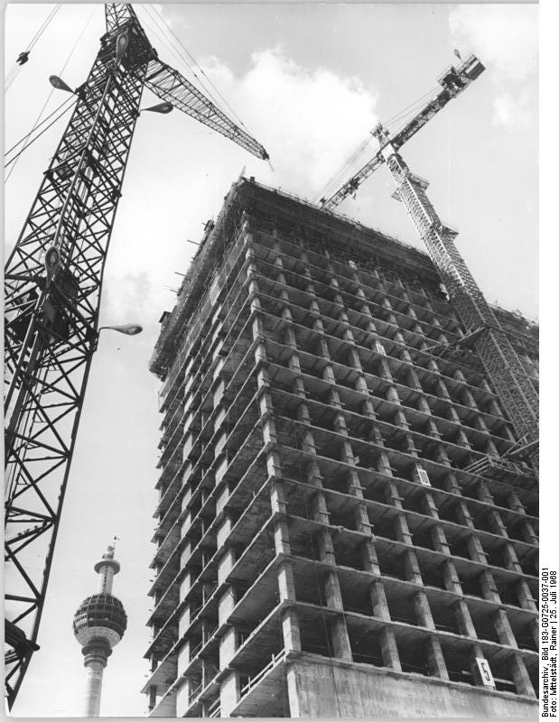 Zentralbild Mittelstädt 25.7.1968 Berlin: Großbaustelle Stadtzentrum Blickfang für jeden Berliner und jeden Berlin-Besucher ist neben dem Fernsehturm der Gleitkern des künftigen Hotels "Stadt Berlin". Die Hotelerbauer erreichten inzwischen schon die 23. Etage, in den unteren Etagen wurde mit dem Ausbau begonnen.